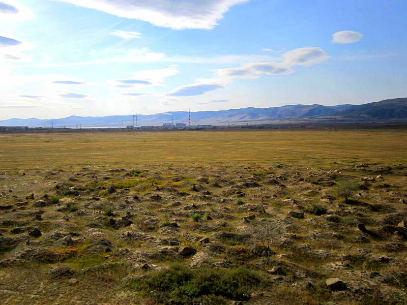 Вдали - Гусиноозёрская ГРЭС. Слева - Гусиноозёрск.